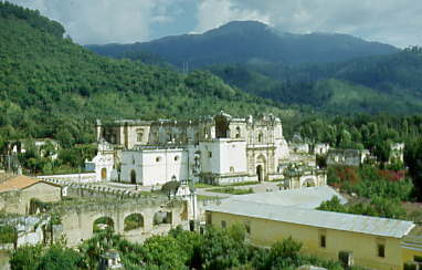 Antigua Guatemala 11 set 1956 San Francisco Church